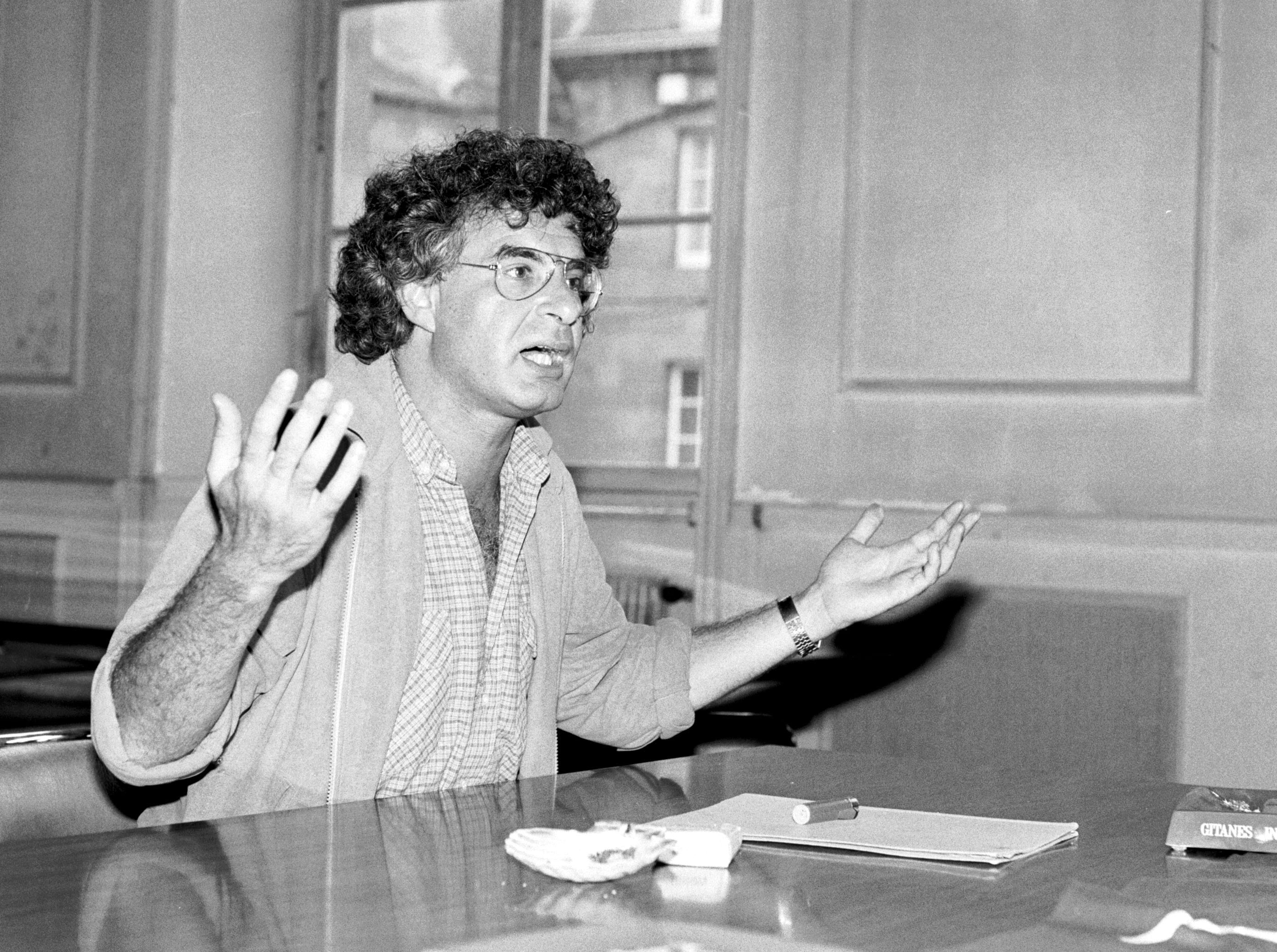 Alain Krivine à Morlaix (Finistère, France) en meeting en juin 1982.